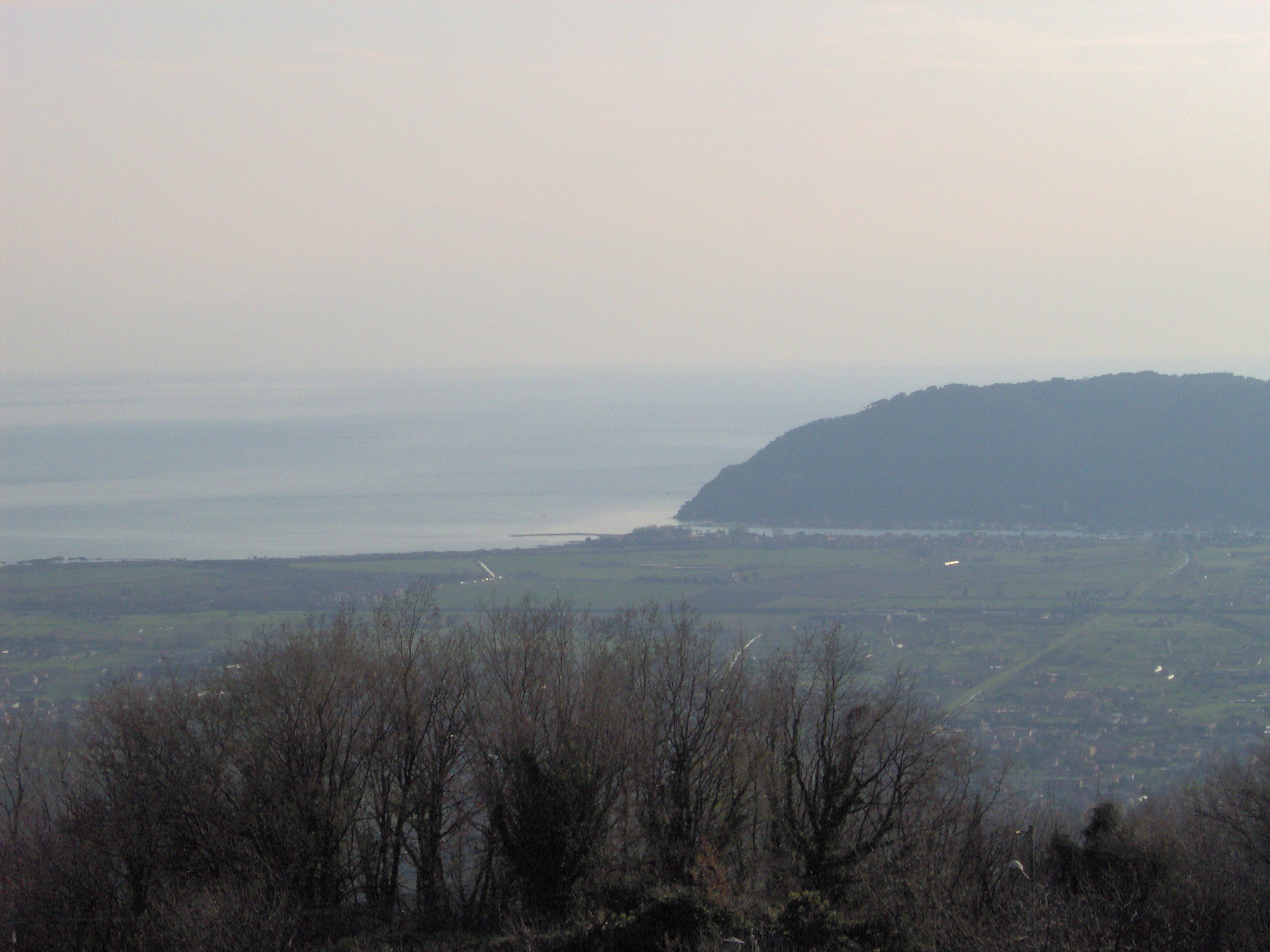 La foce del fiume Magra vista dal borgo di Vallecchia (Fraz. Castelnuovo Magra)